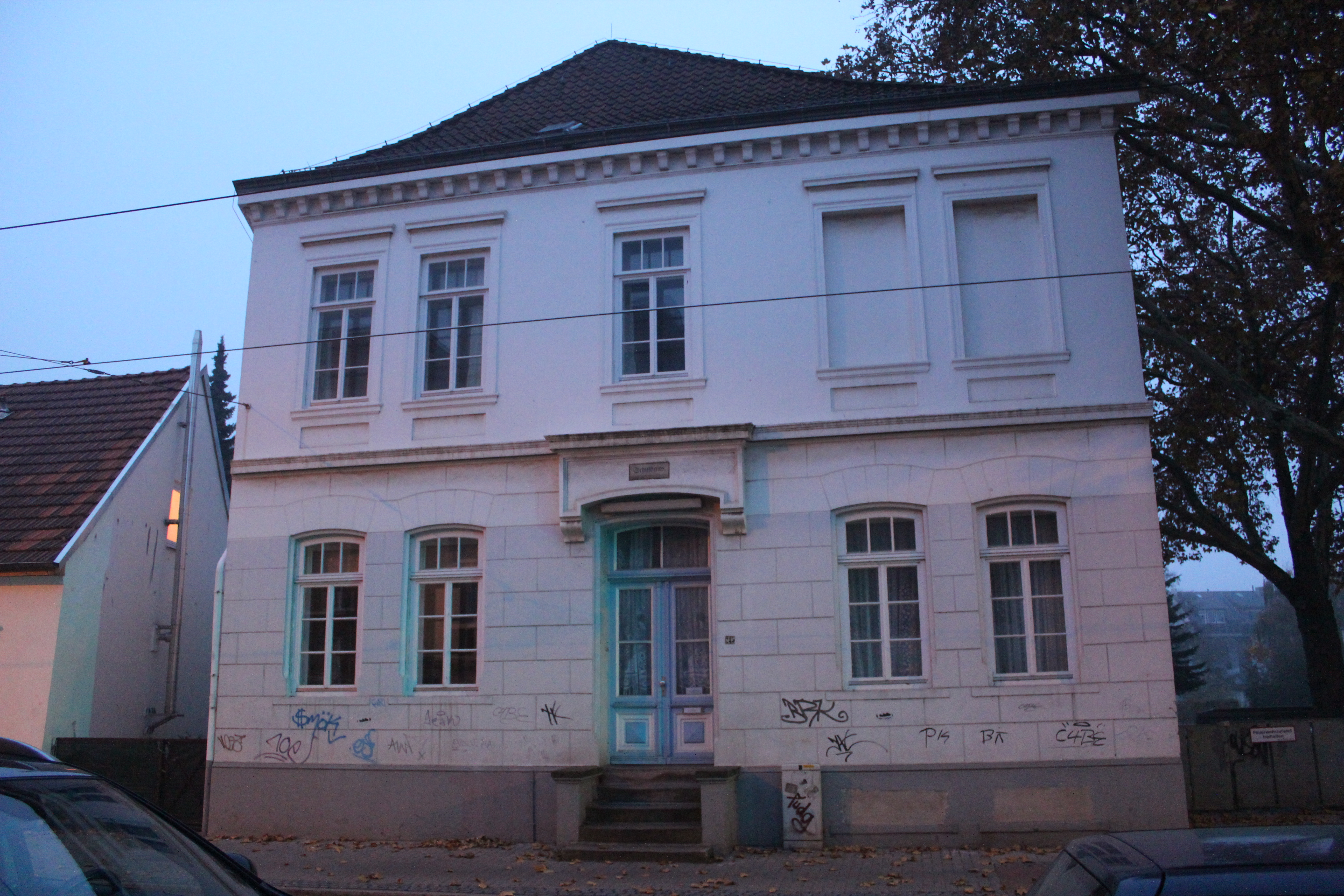 Freischule, Landschule in Bremen, Buntentorsteinweg 245. Das abgebildete Objekt ist ein geschütztes Kulturdenkmal in der Freien Hansestadt Bremen, mit der Nr. 0257 beim Landesamt für Denkmalpflege registriert.